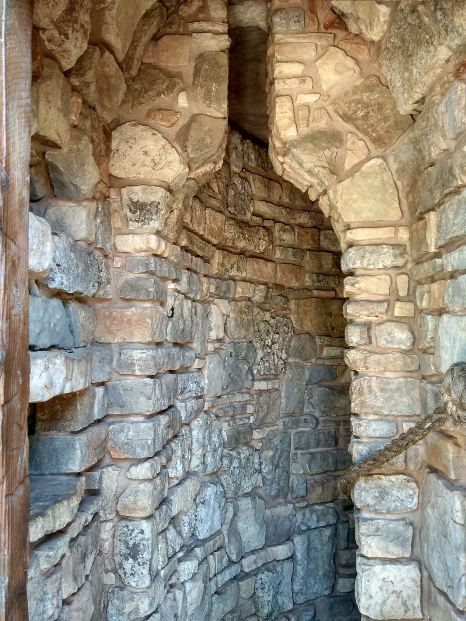 הכניסה המחודשת למרתף היין העתיק שבגבעות עולם.